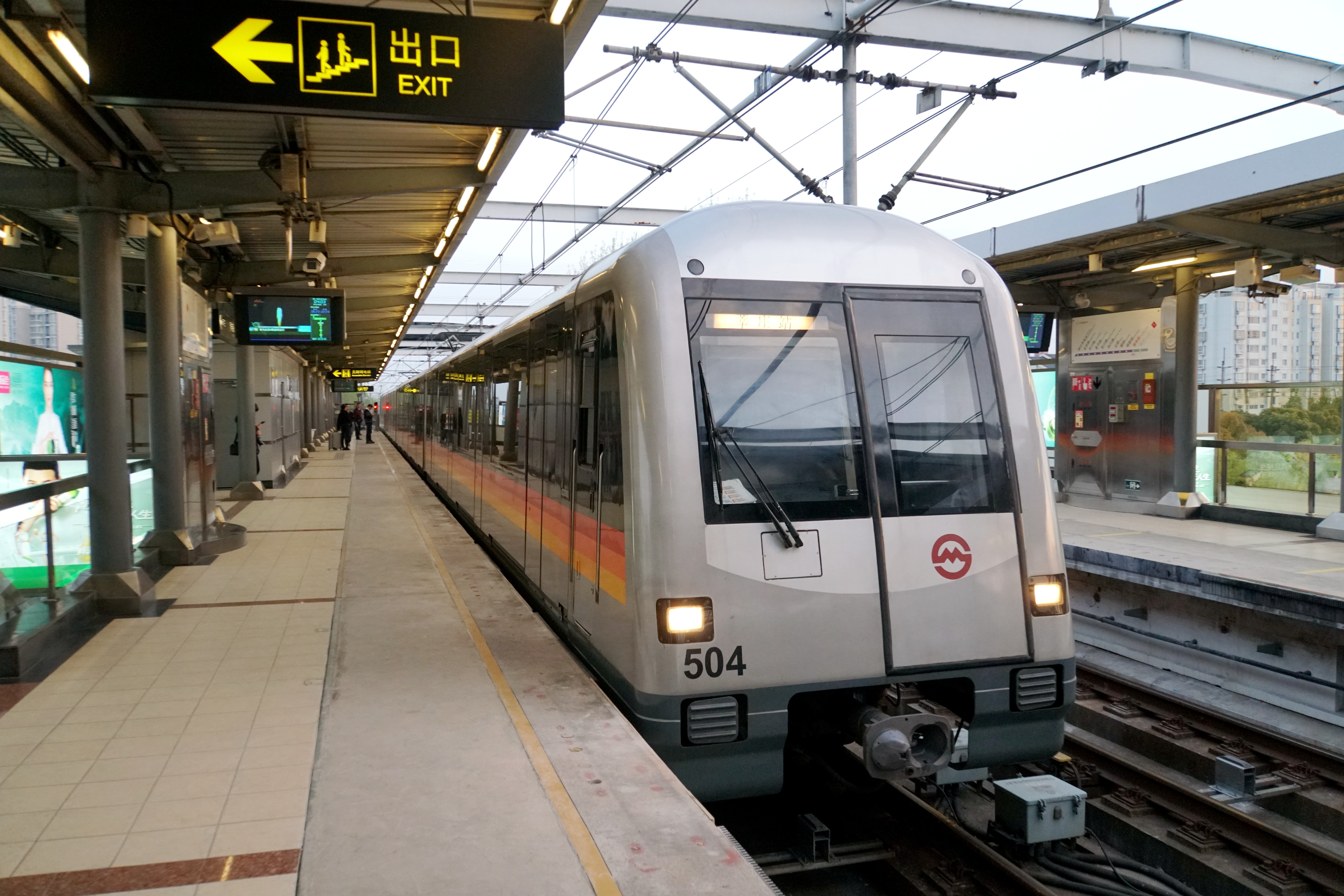 05c01型列车进入无安全门的春申路站